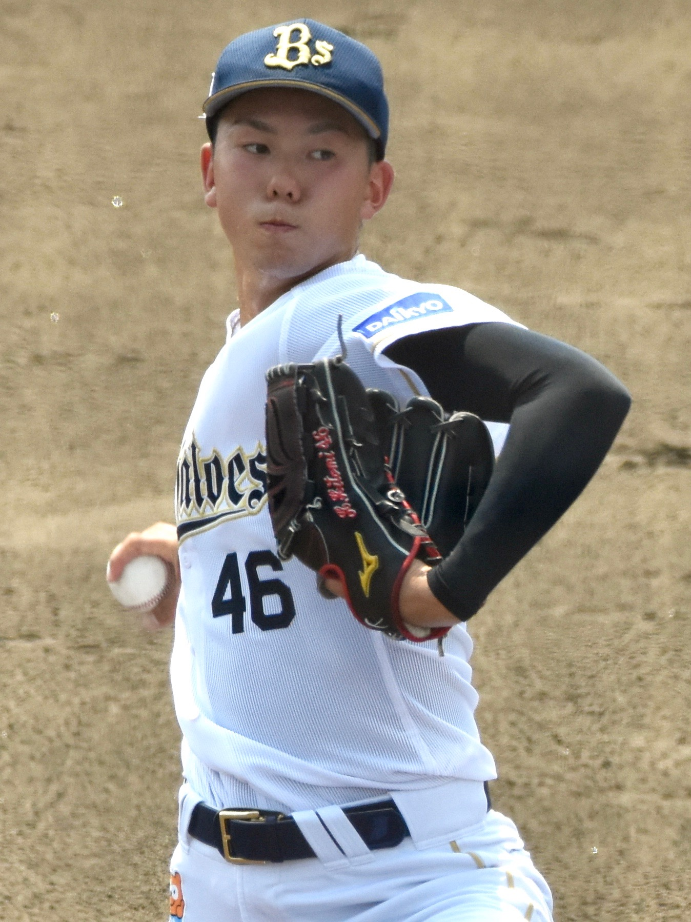 2018年7月17日、舞洲バファローズスタジアムにて撮影